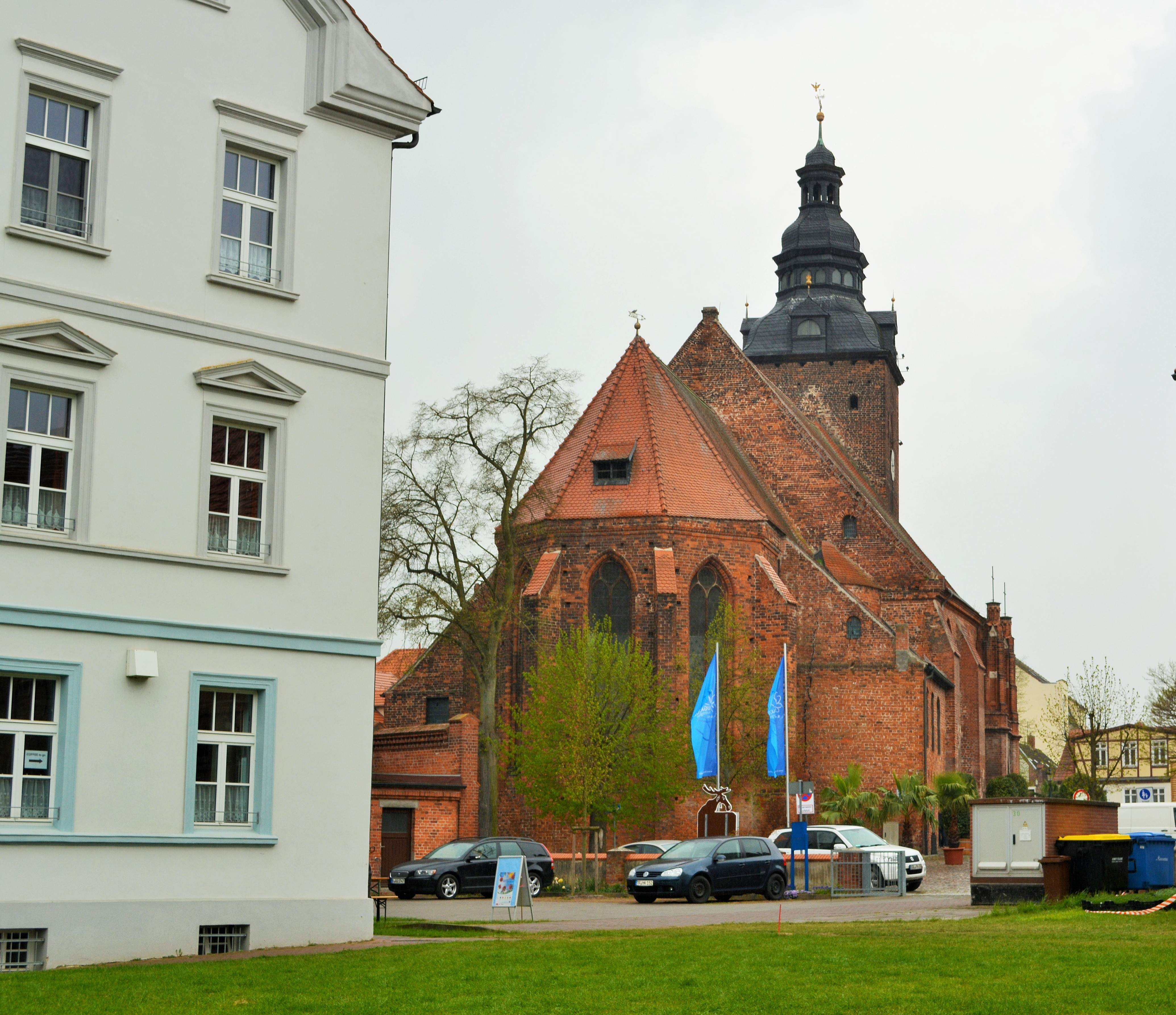 Denkmalgeschützte evangelische Stadtkirche St. Laurentius. Dreischiffige Hallenkirche mit Grabepitaphien Havelberger Bürger im Eingangsbereich, Ursprung der Kirche liegt in der 2. Hälfte des 12. Jahrhunderts.